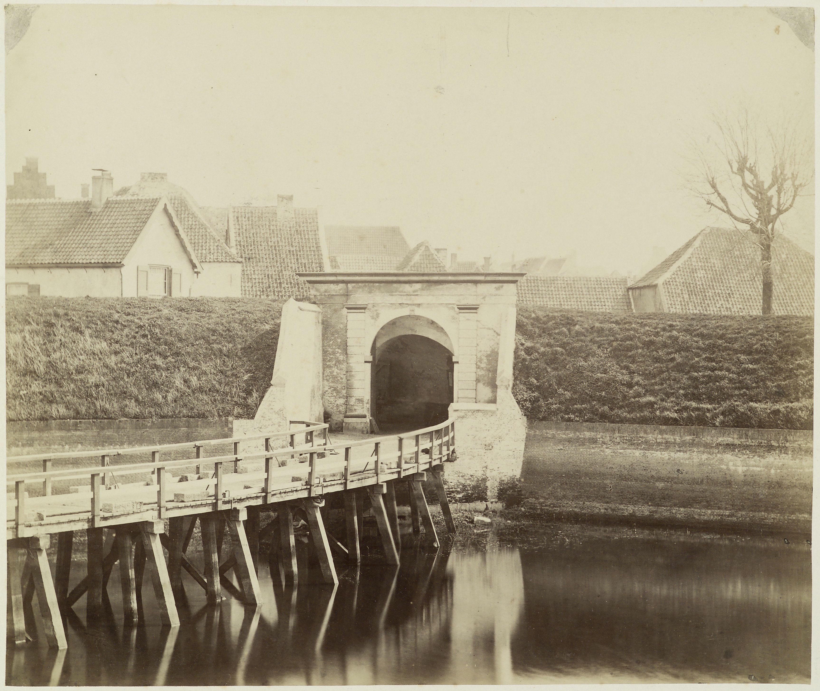 Sint Janspoort: Brug wal en stadspoort buitenzijde (opmerking: Op achterzijde schoonschrift)